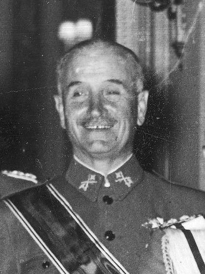 Comitiva de generales españoles en Berlín, durante el viaje de vuelta de la Legión Cóndor a Alemania. En la foto aparecen: Walther von Brauchitsch: General, comandante en jefe del Ejército alemán. Wolfram von Richthofen: General de la Luftwaffe, antiguo comandante de la Legión Cóndor. Gonzalo Queipo de Llano: General, comandante del Ejército del Sur. Juan Yagüe Blanco: General, comandante del Cuerpo de Ejército Marroquí. Antonio Aranda Mata: General.